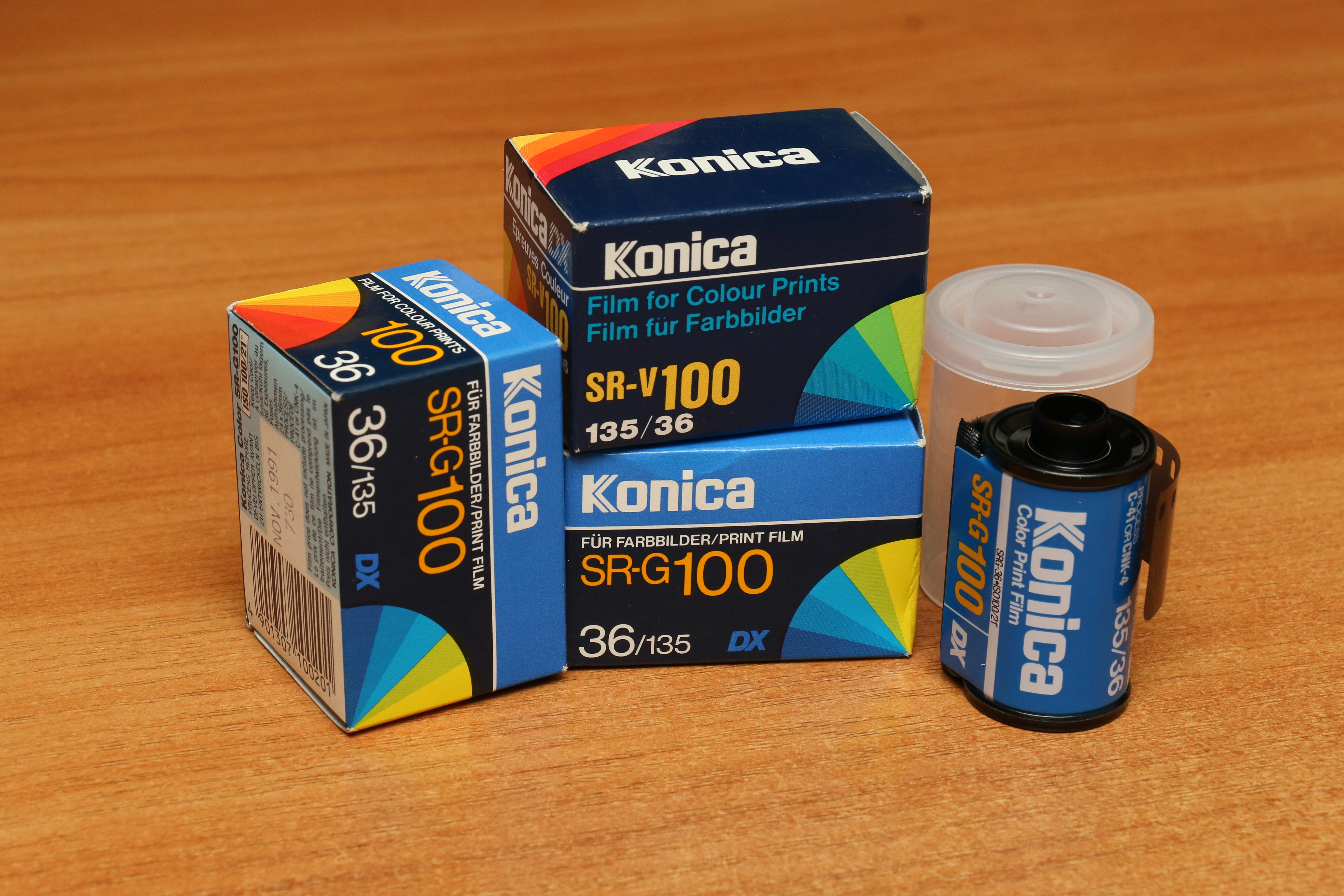 Фотопленка Konica SR-V 100 и SR-G 100, срок годности до 1991